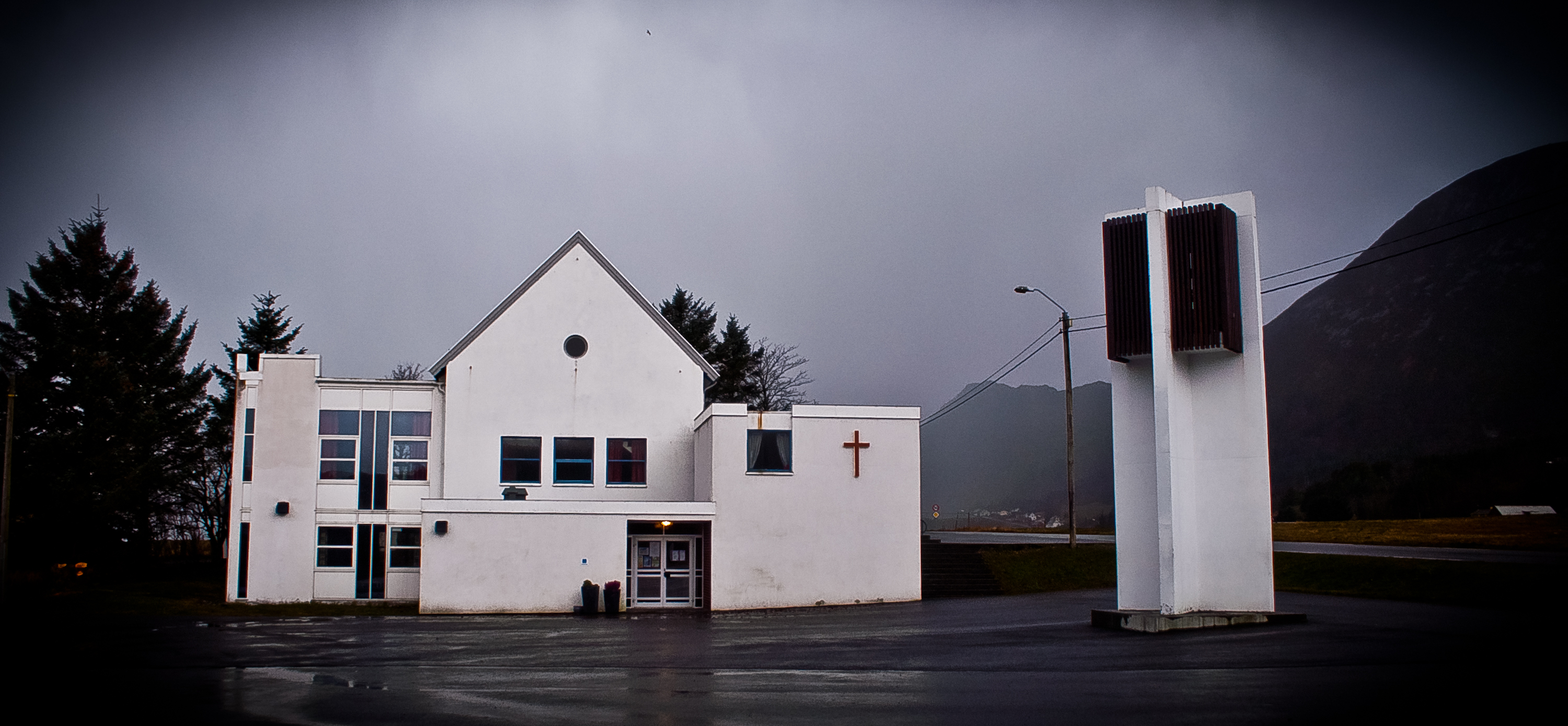 Godøy bedehuskapell fra 1953 i Giske kommune i Møre og Romsdal.